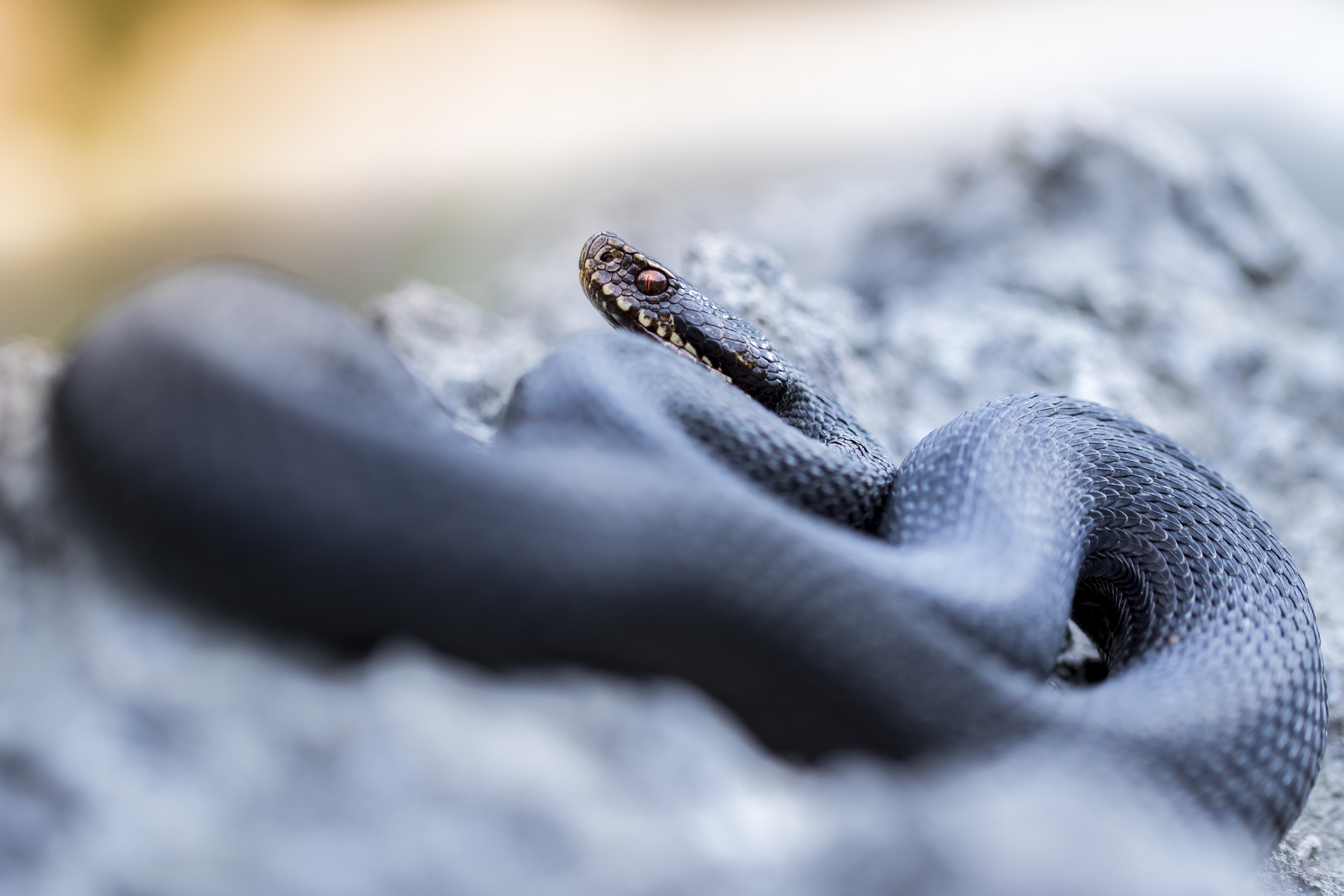 Parco naturale delle Dolomiti Friulane (Q683241)